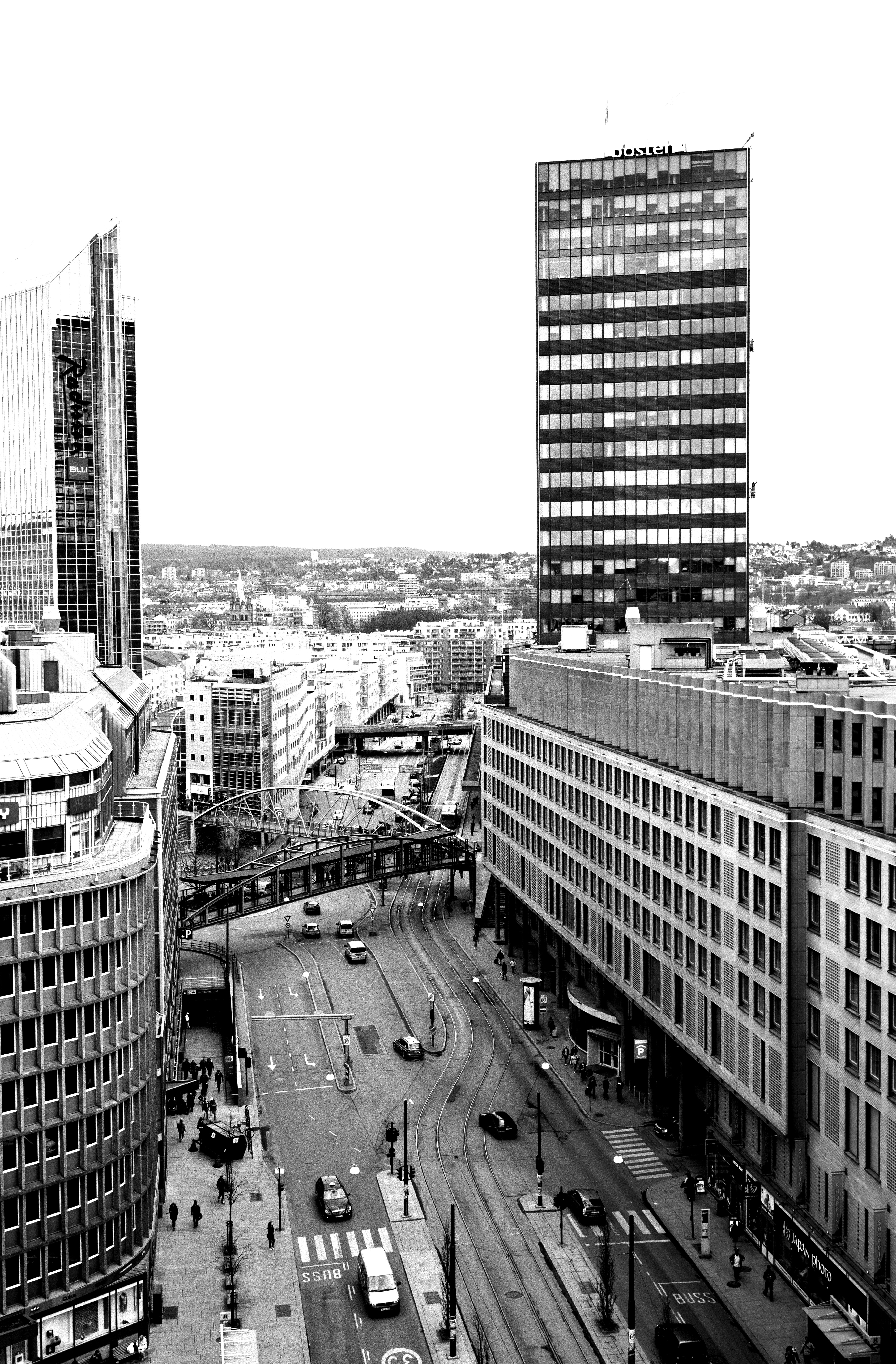 Bildet viser Postgirobygget (til høyre) og hotel Plaza (til venstre). Ekeberg skimtes i bakgrunnen.